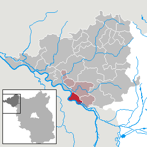 Rühstädt in Brandenburg (Country) - District Prignitz